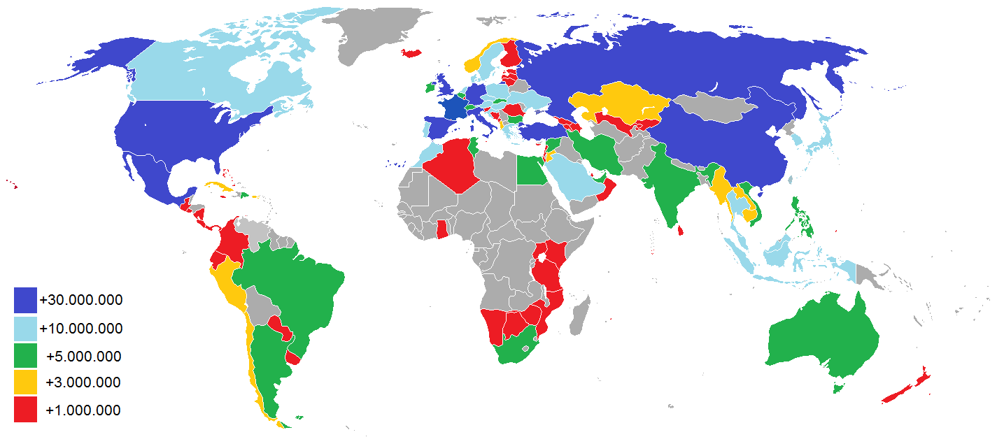 Datos en colores de los destinos turísticos mundiales